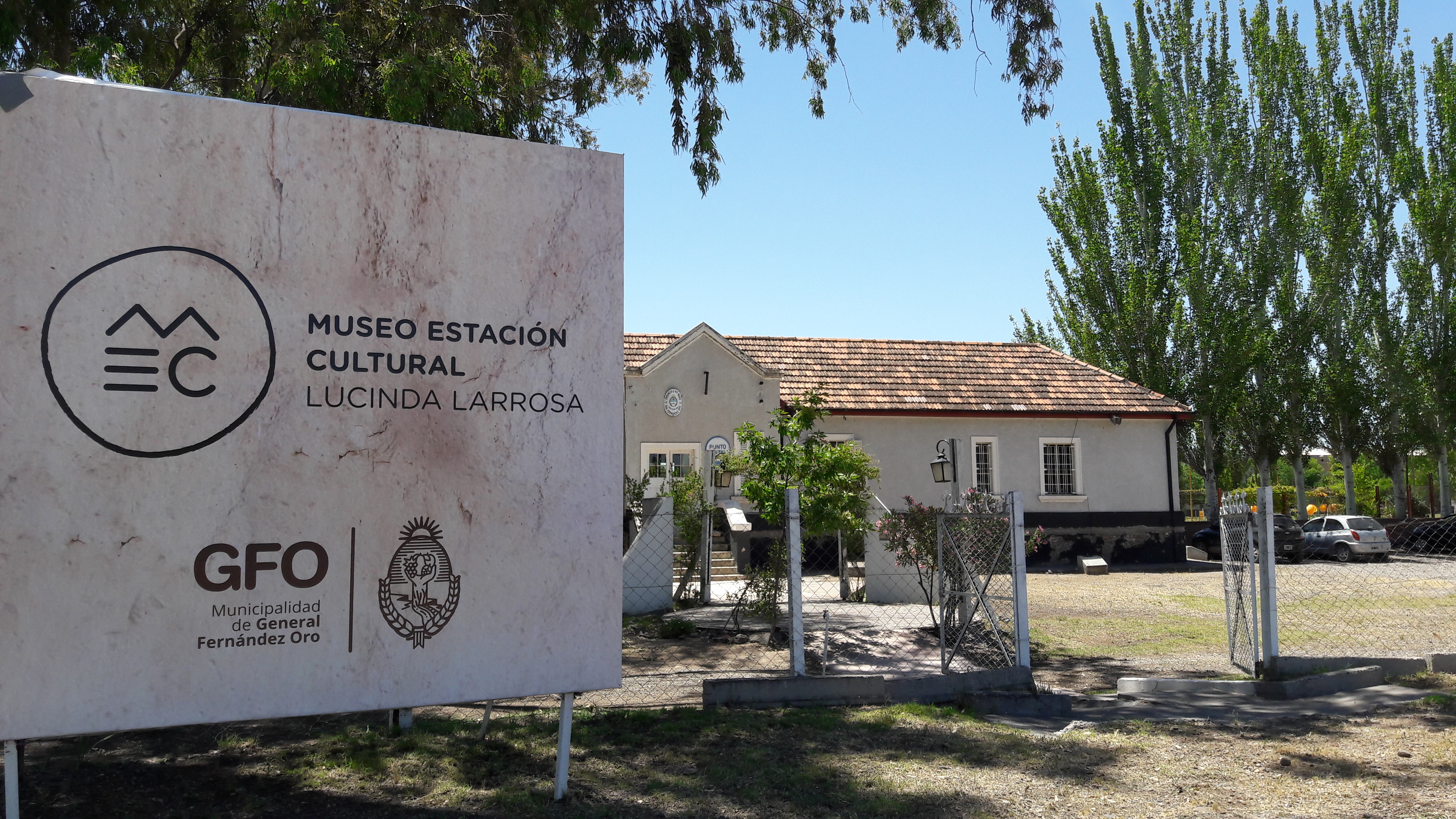 Museo de Fernández Oro